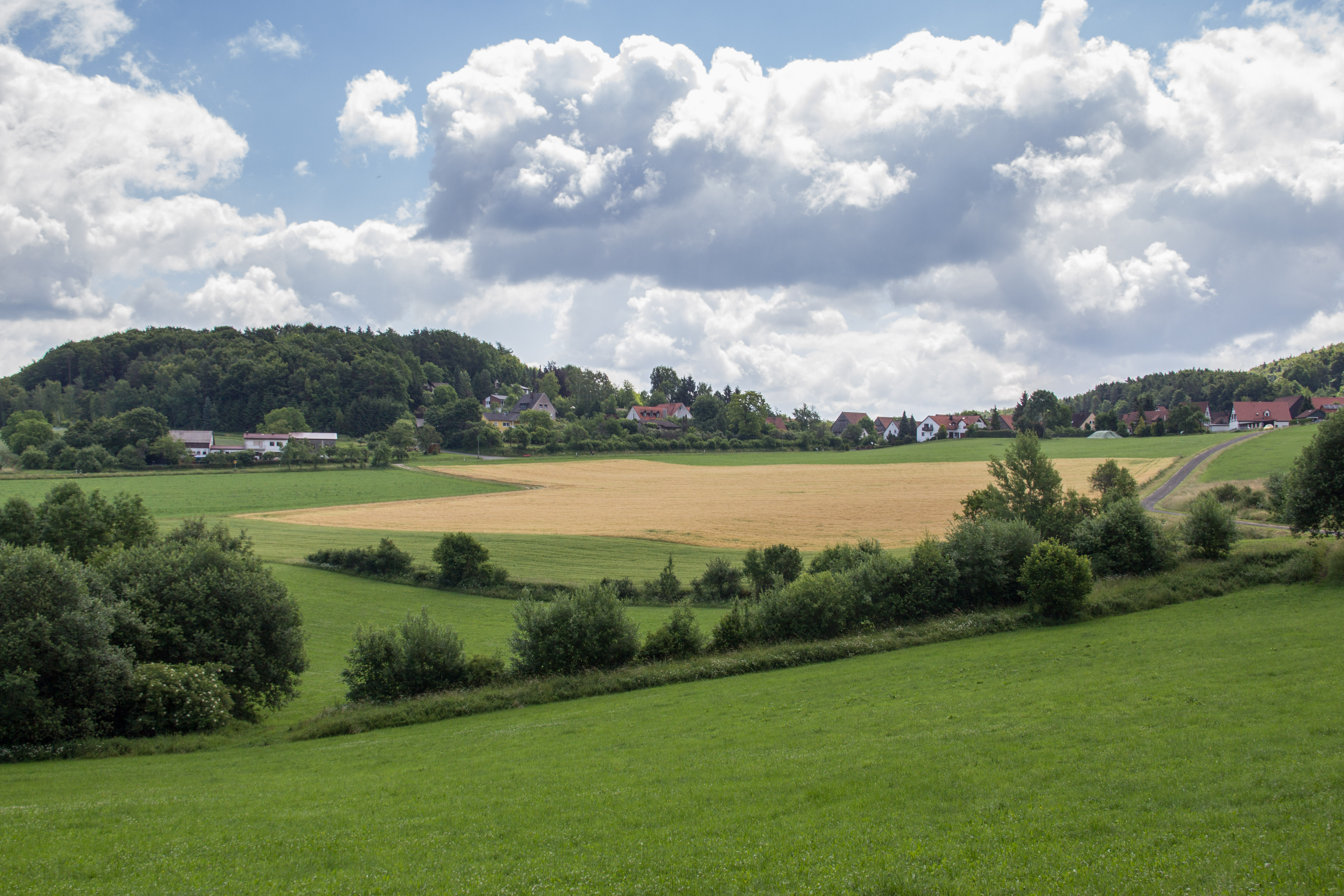 Trainmeusel, Ortsteil von Wiesenttal, Fränkische Schweiz, Ortsansicht